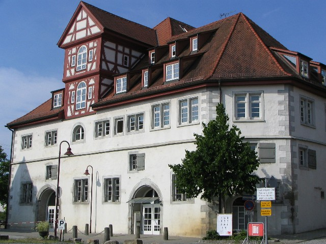 Rathaus Eberdingen